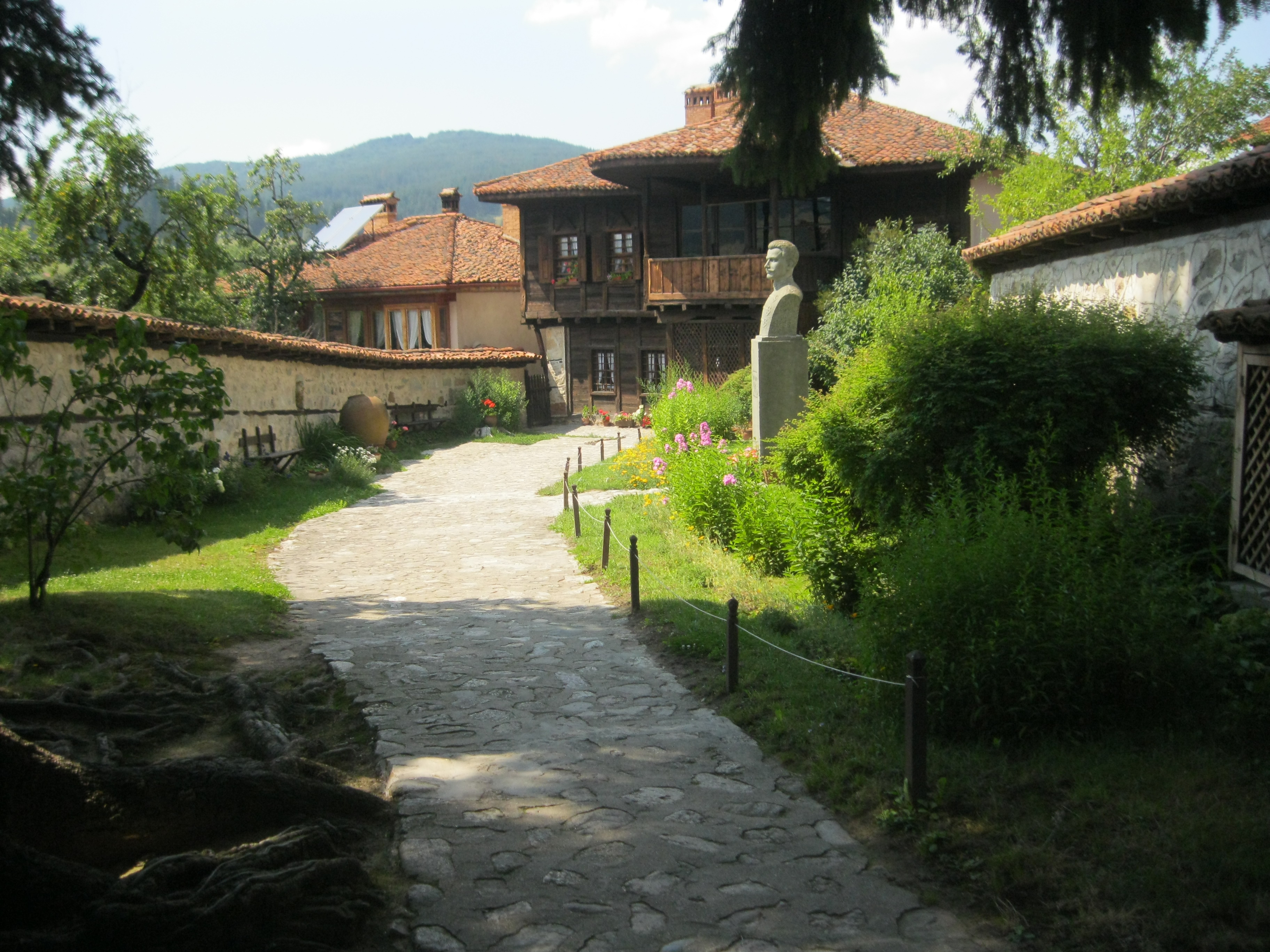 Къща - музей Георги Бенковски